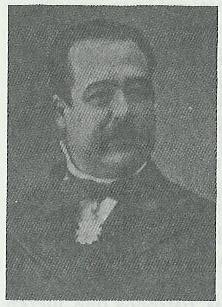 D. José de Torres Ortega (1833-1902)